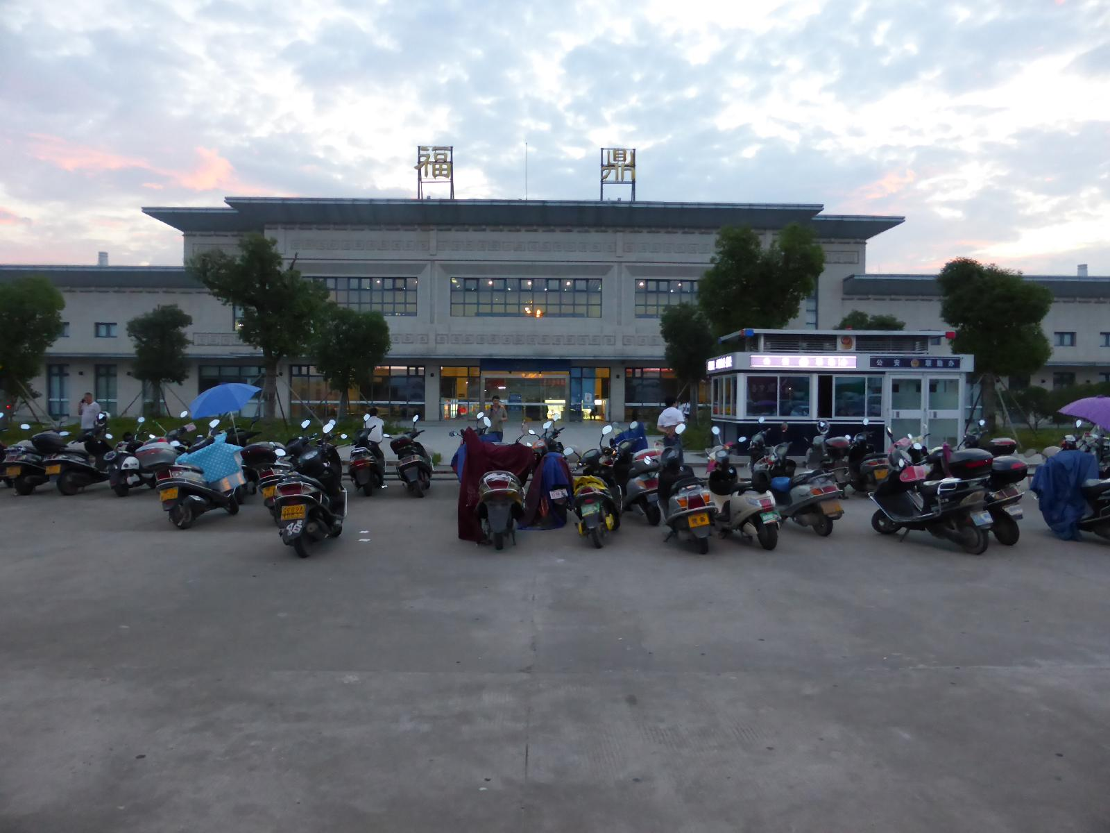 福鼎駅正面入り口